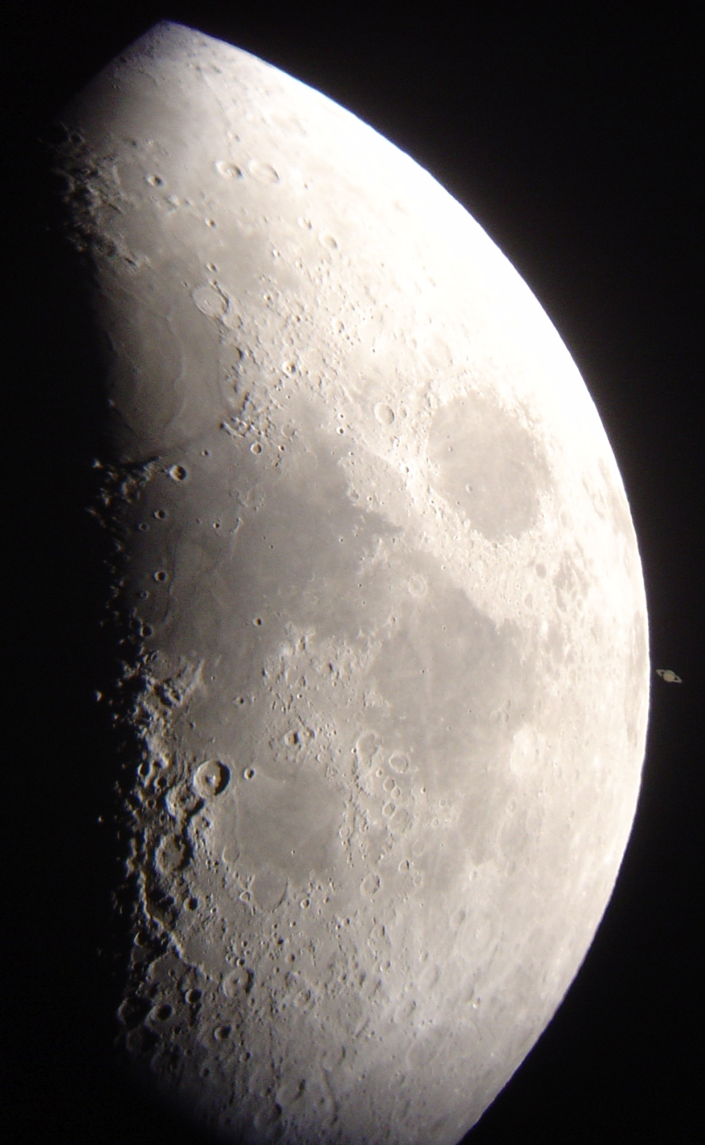 Transit de la Lune devant Saturne / Moon transit in front of Saturn